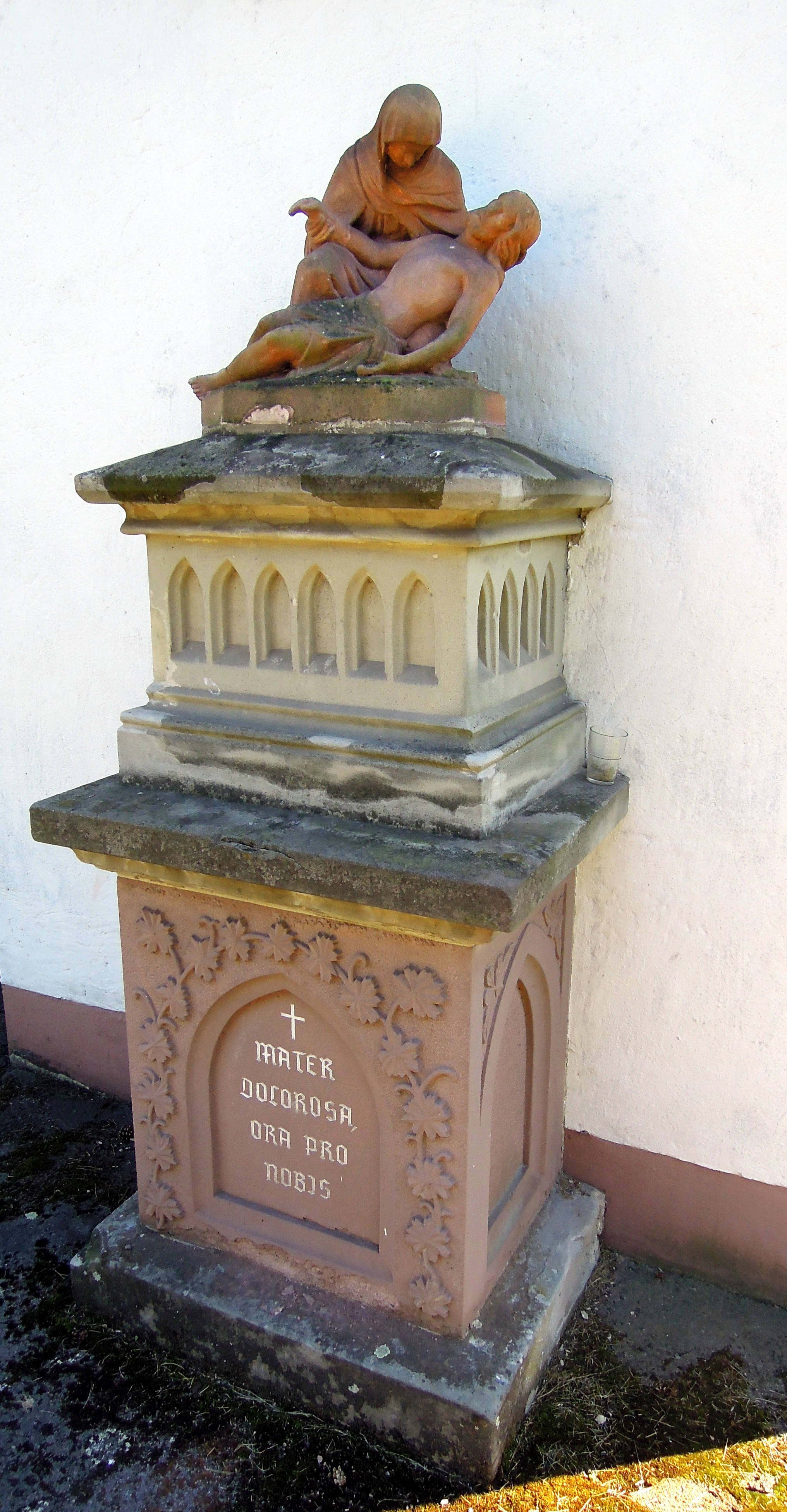 St. Apollonia Rodener Straße, Friedhofskapelle St. Apollonia vor 1870 (Einzeldenkmal